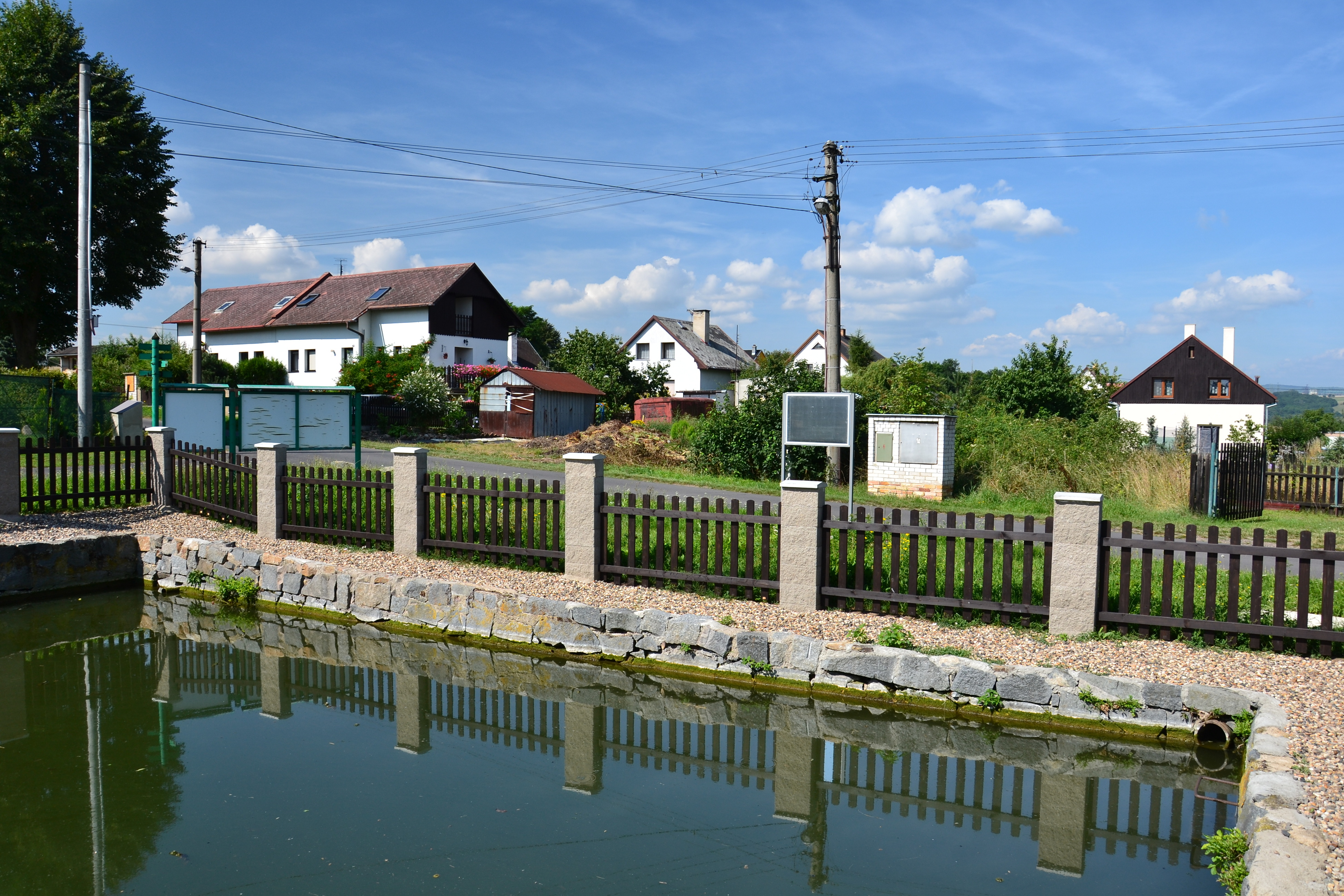 Vadkovice - náves s vodní nádrží